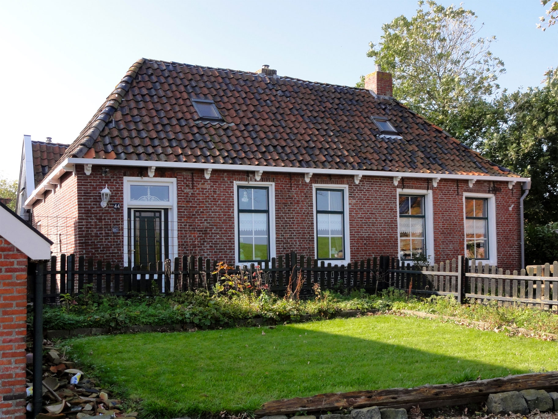 Woonhuizen aan De Oere 42 en 44 in Moddergat